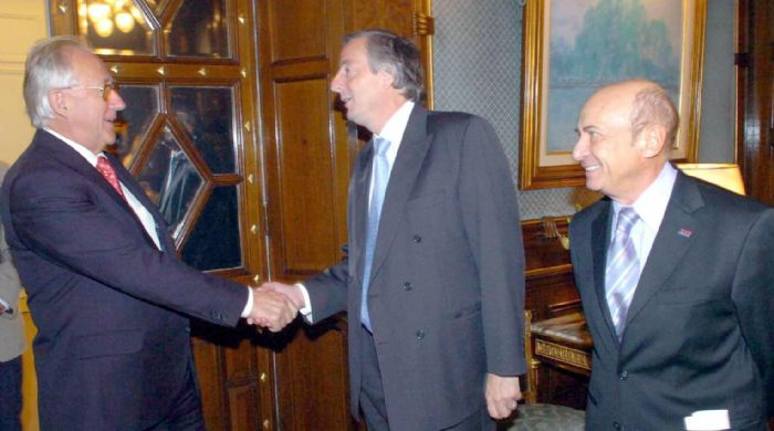 Casa Rosada,Despacho Presidencial - El presidente de la Nación, Néstor Kirchner, junto a los empresarios supermercadistas, Horst Paullman y Alfredo Coto.